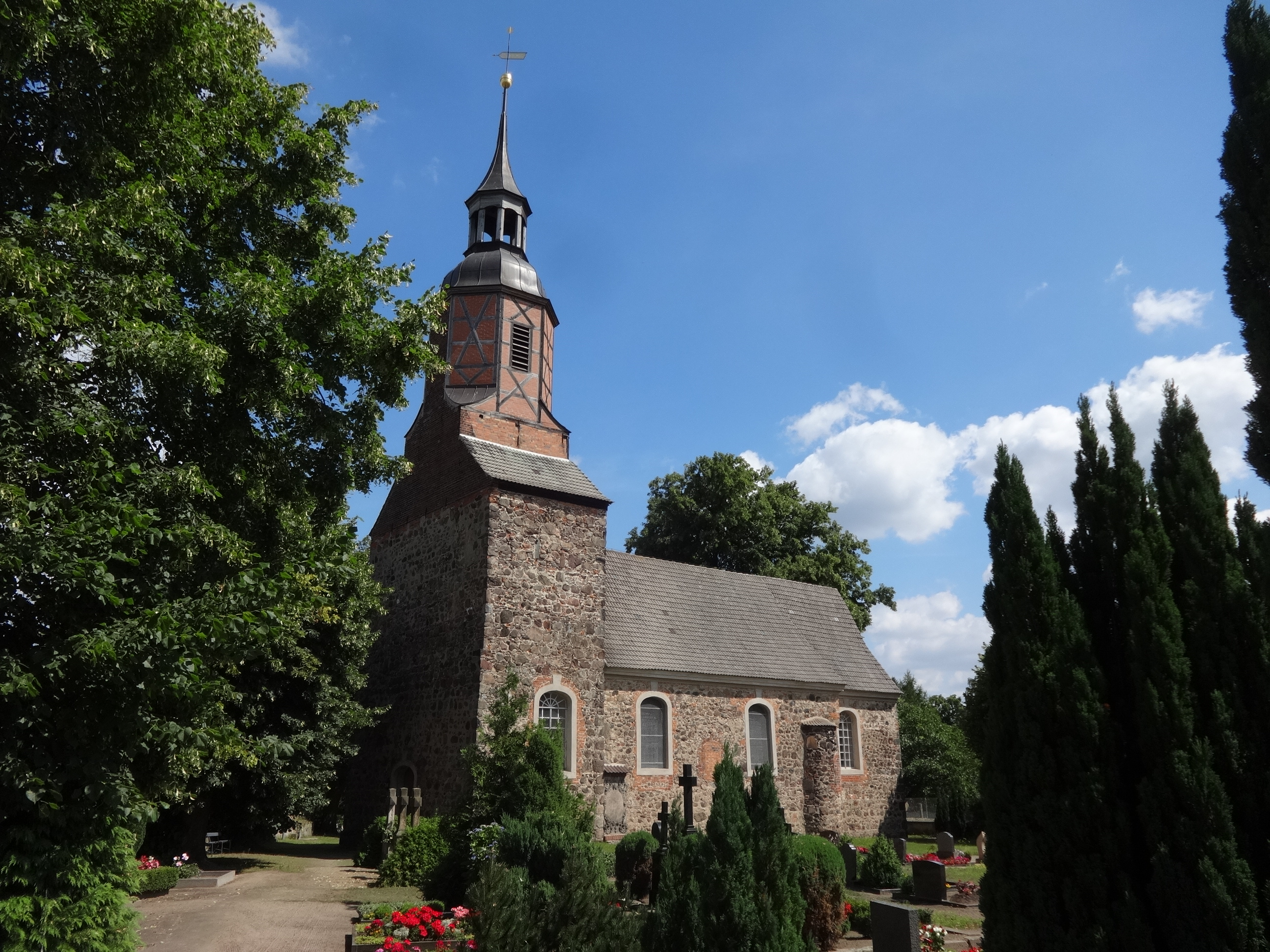 Die Dorfkirche Uckro ist ein Feldsteinkirche, die vermutlich Ende des 14., Anfang des 15. Jahrhunderts entstand. Im ersten Drittel des 18. Jahrhunderts baute die Kirchengemeinde eine barocke Patronatsloge an. Im Innern befinden sich unter anderem ein Altarretabel, das um 1700 entstand. Es zeigt in der Predella das Abendmahl Jesu und in seinem durch Weinlaubsäulen in drei Feldern gegliedertem Hauptbild die Kreuzigung Christi, flankiert von Geburt und Auferstehung Jesu Christi. Oberhalb des Hauptbildes ist die Himmelfahrt zwischen zwei Engeln mit Leidenswerkzeugen dargestellt. Das Werk schufen der Calauer Kunsttischler Georg Wolschke sowie der Lübbener Fassmaler Michael Scharbe.